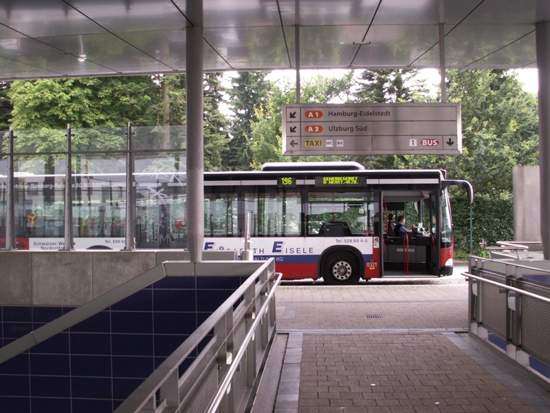 AKN Bahn 2007